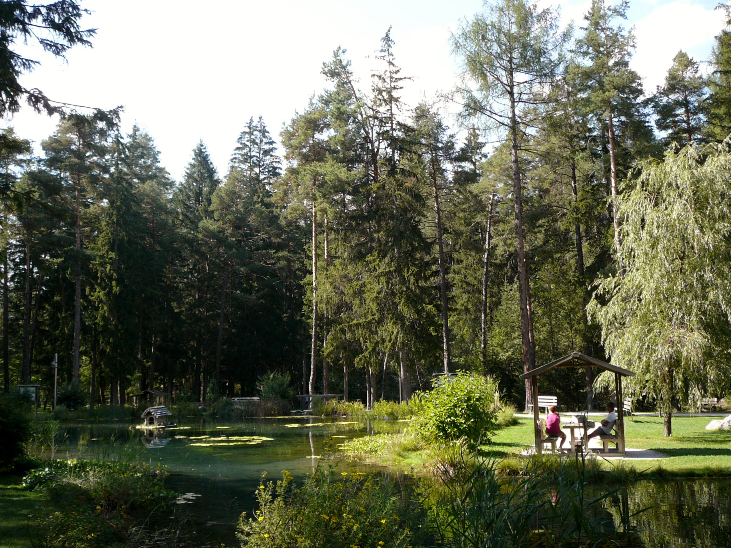 laghetto a Villabassa